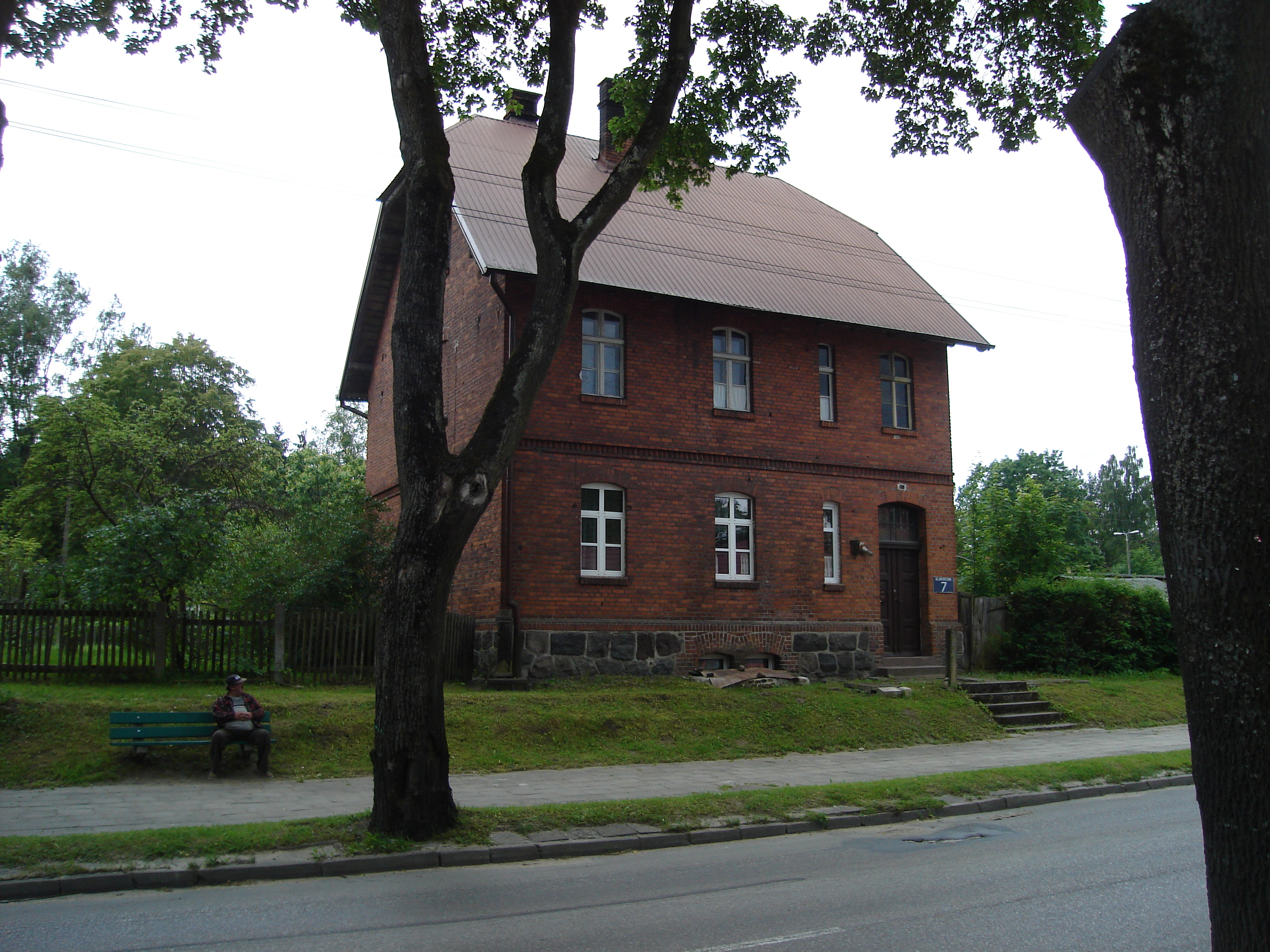 Budynek przy torach